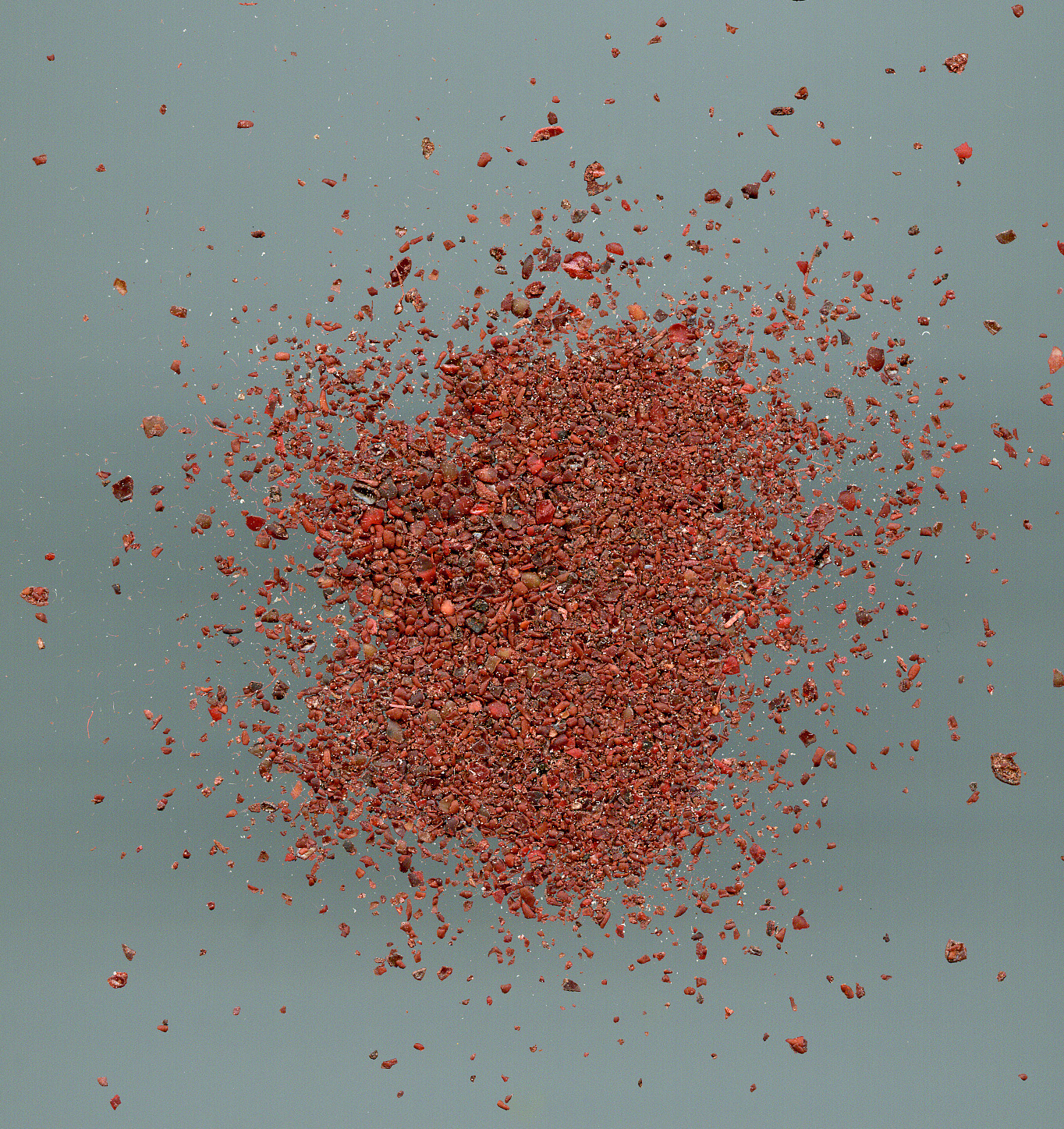 Sumak (gemahlene Früchte des Gerbersumach). Rhus coriaria. Eigene Aufnahme, GNU FDL